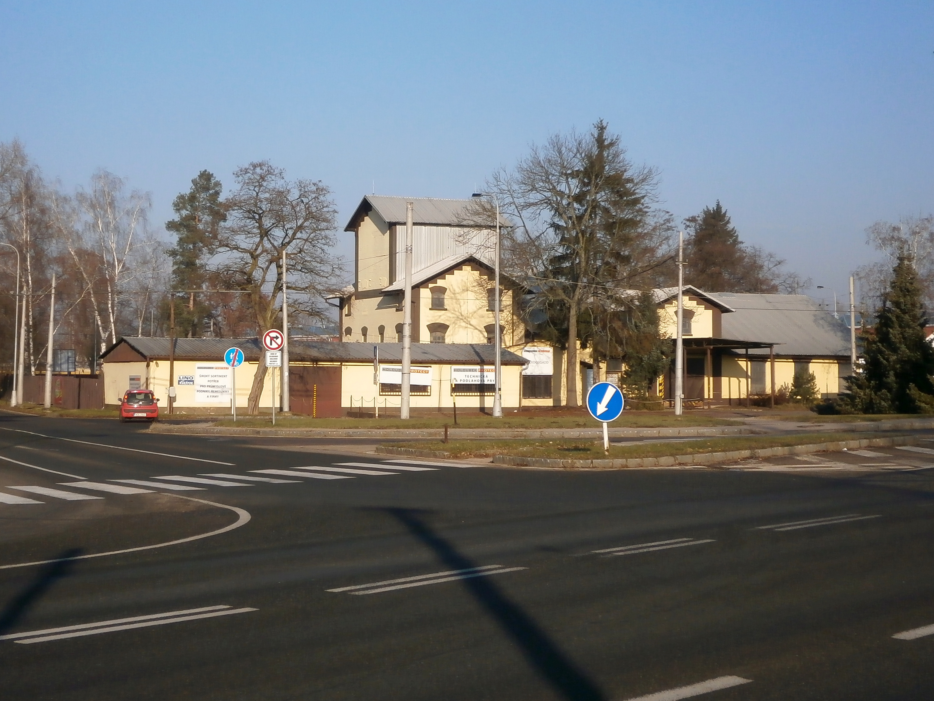 Lipová čp. 40 (Hradec Králové)